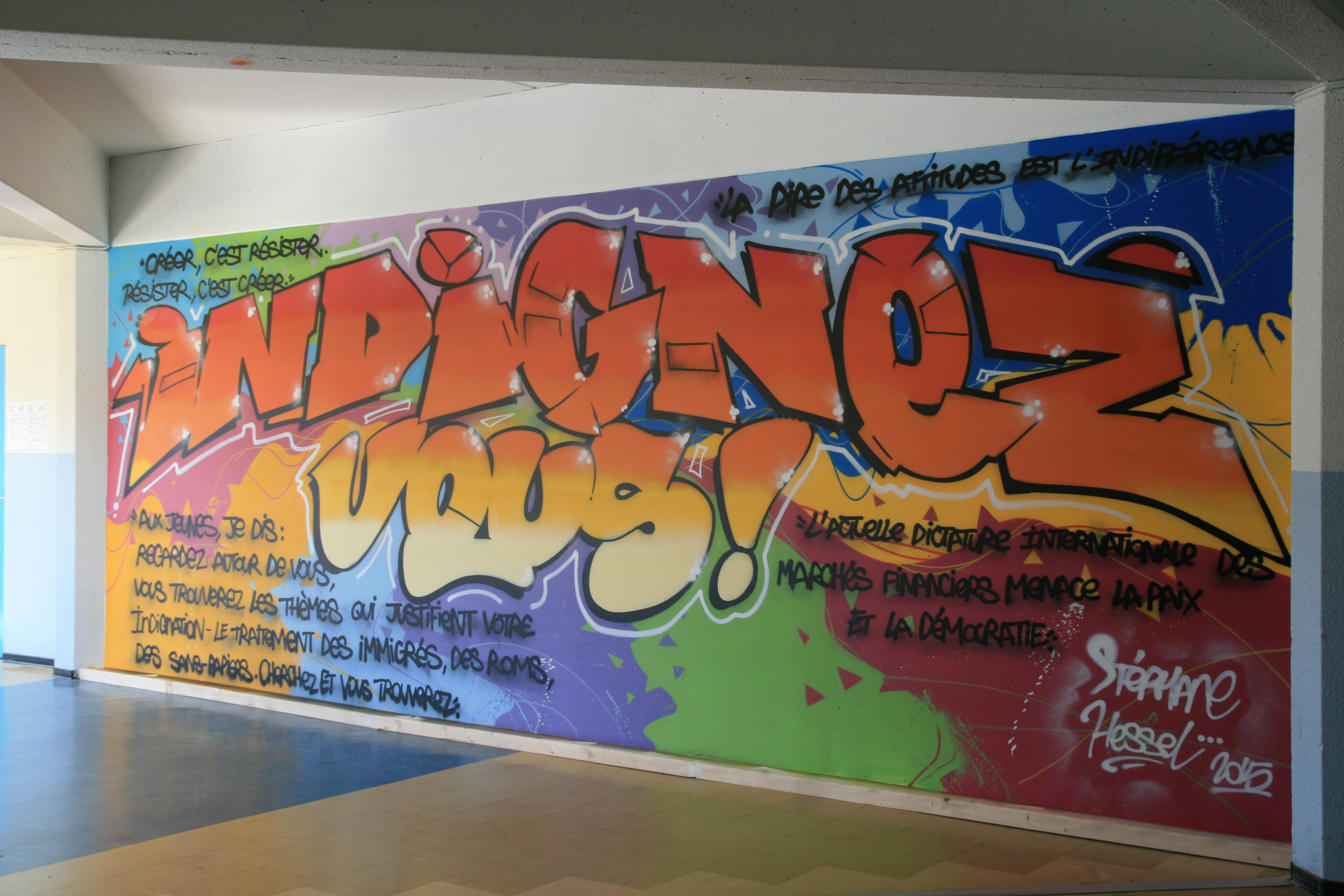 Lycee Stephane Hessel (Toulouse) : TAG fresque